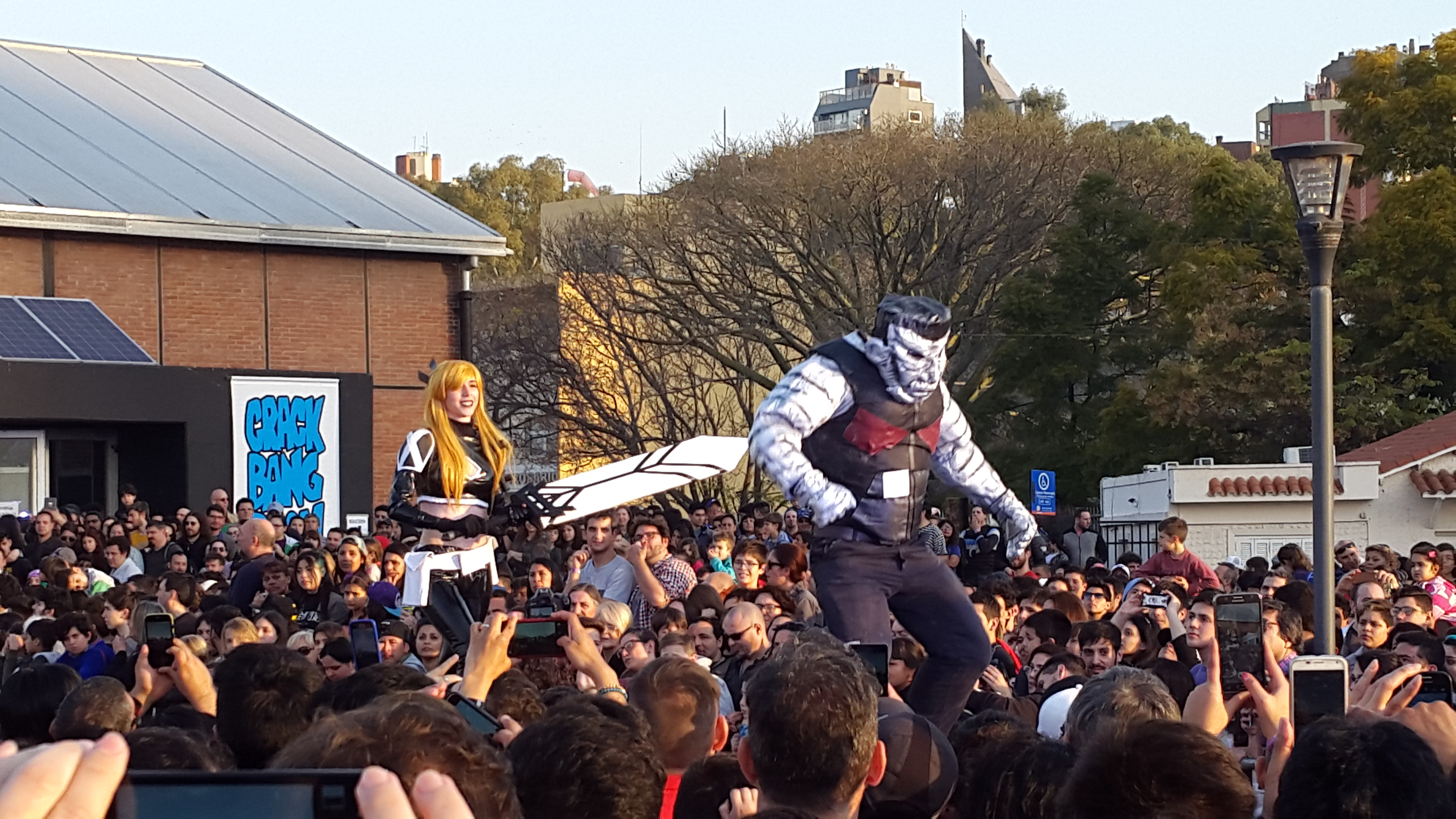 Desfile